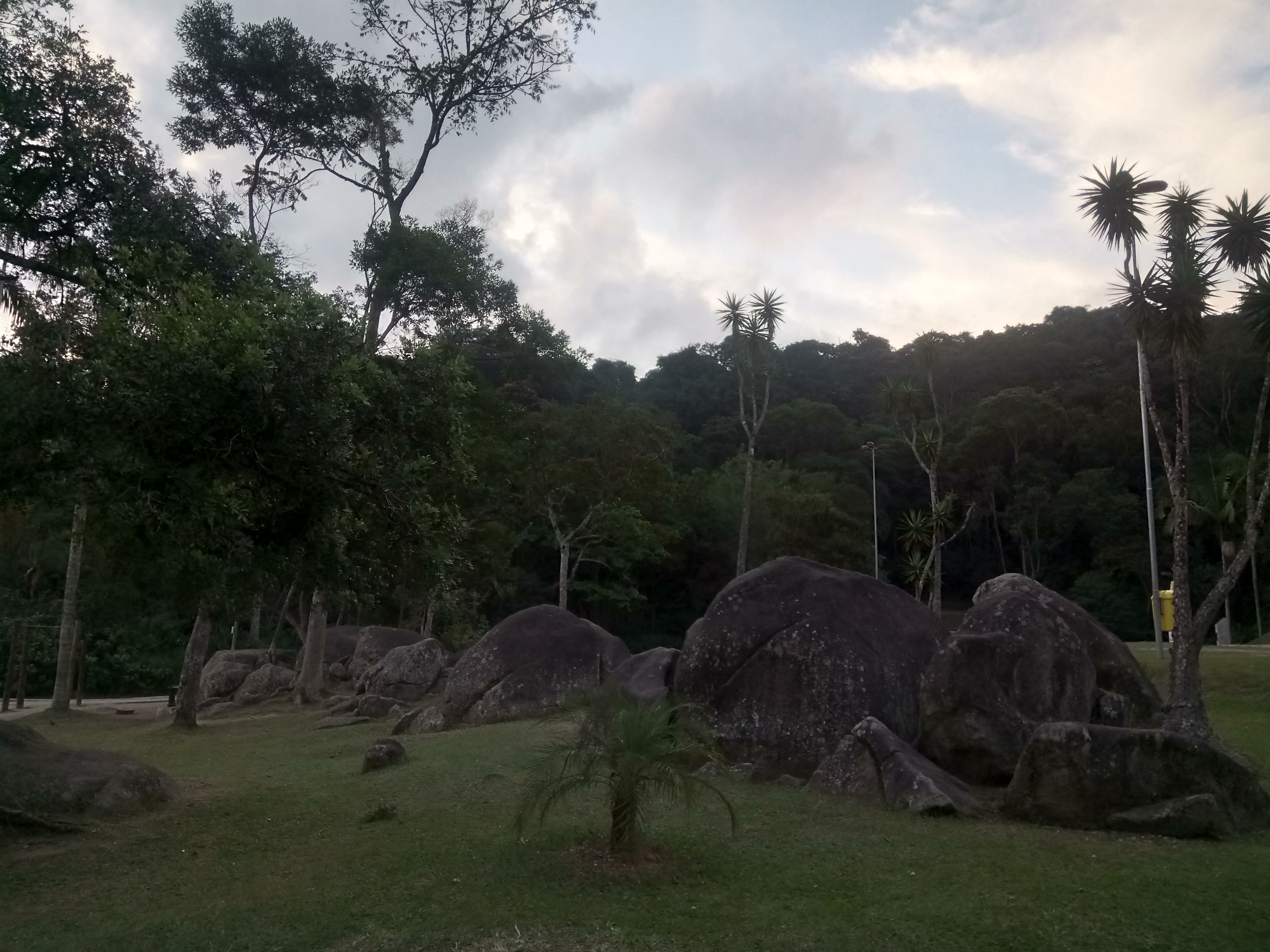 Centro do Parque